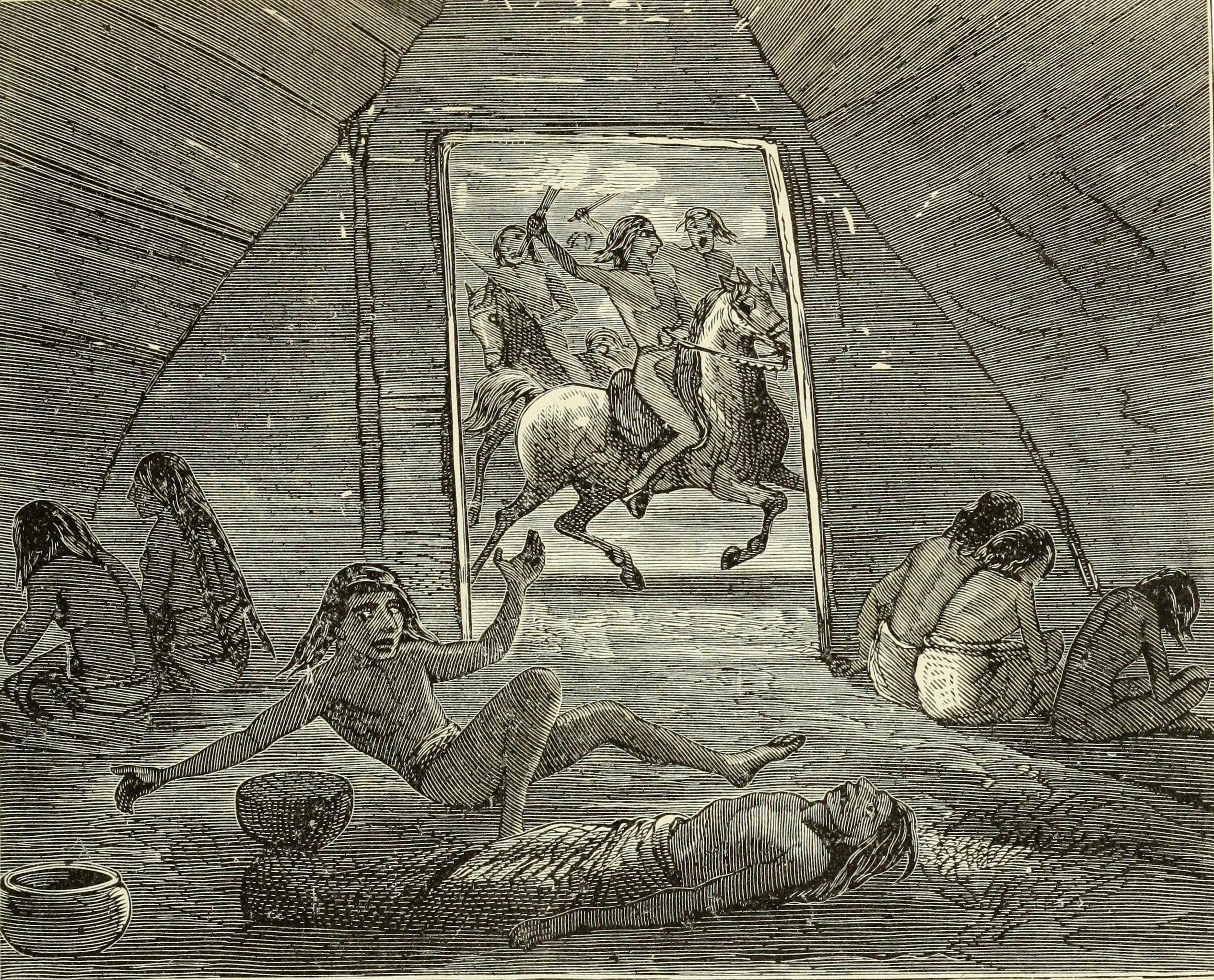 Mapuche medicine (circa 1871)